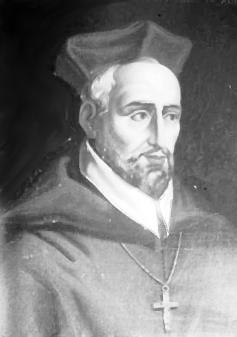 Portrait du cardinal Clément de la Rovère